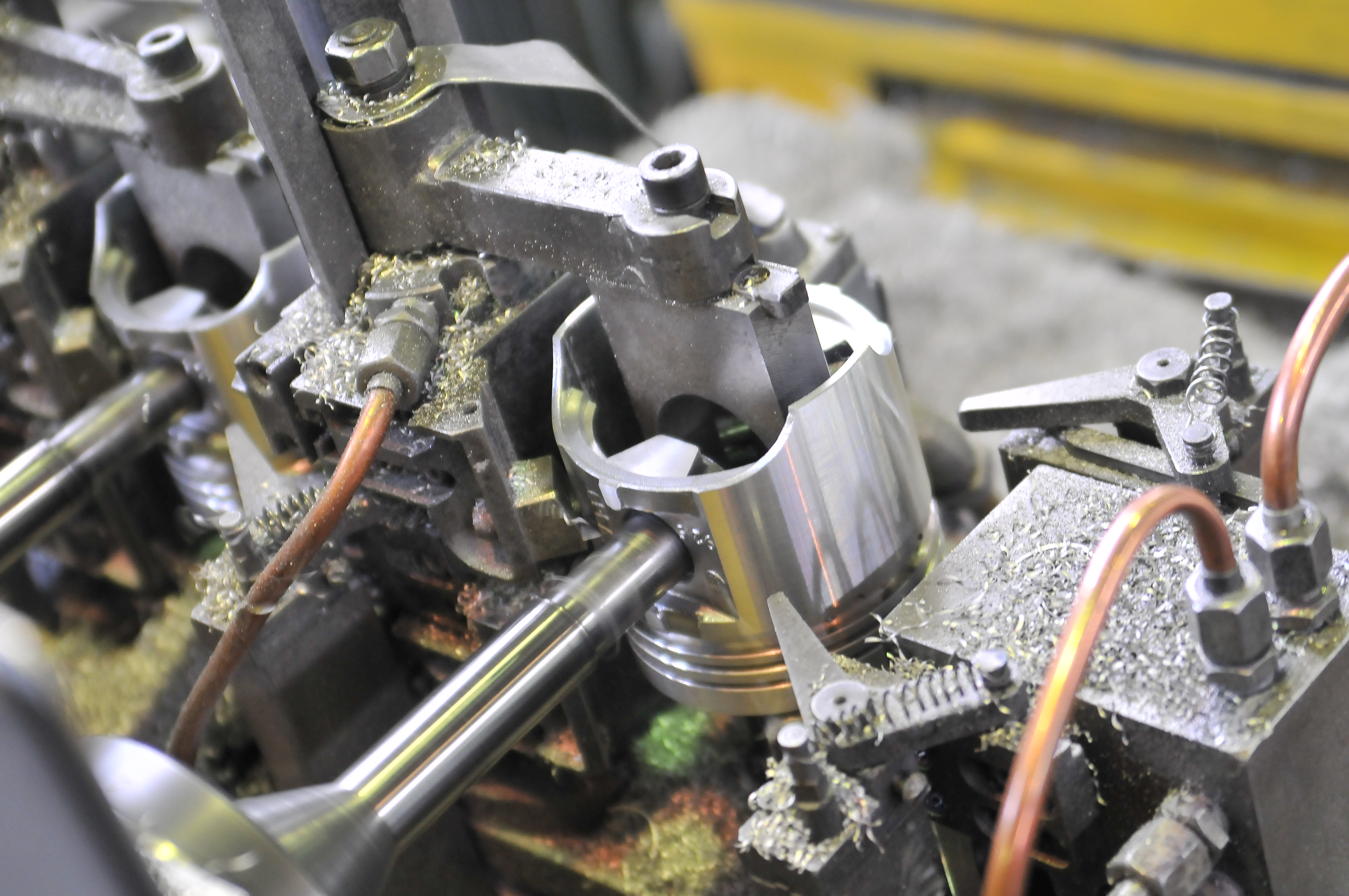 Фотография иллюстрирует операцию по расточке пальцевого отверстия поршня